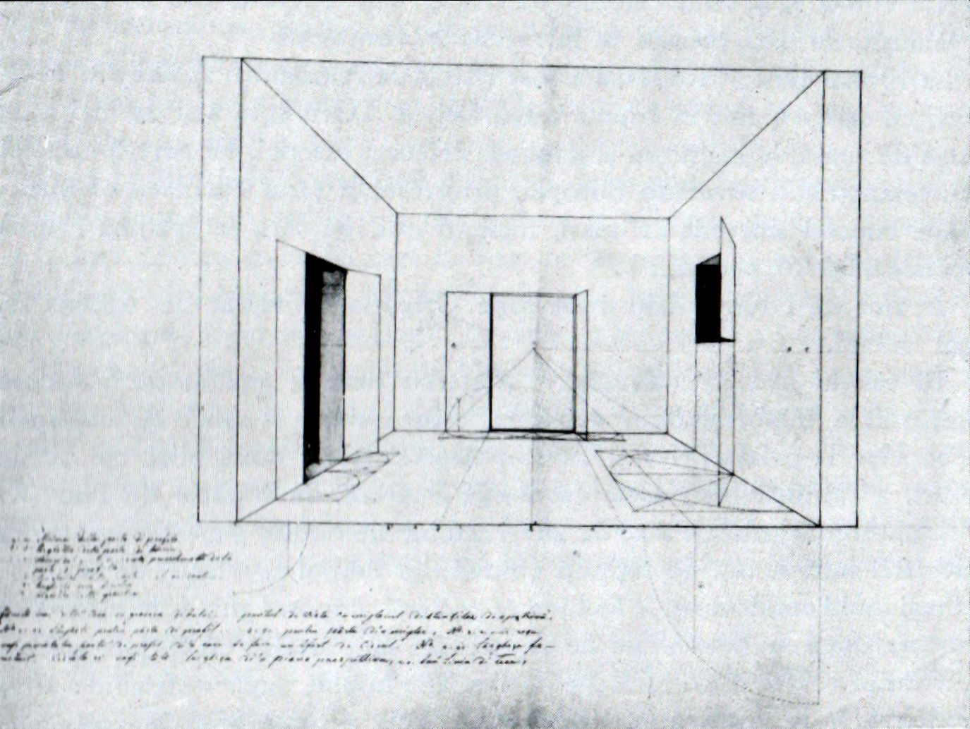 Gheorghe Tattarescu - Studiu de perspectivă dintr-un ciclu de 50 de foi, desen în peniță, 0,24x0,35m - Muzeul Gheorghe Tattarescu